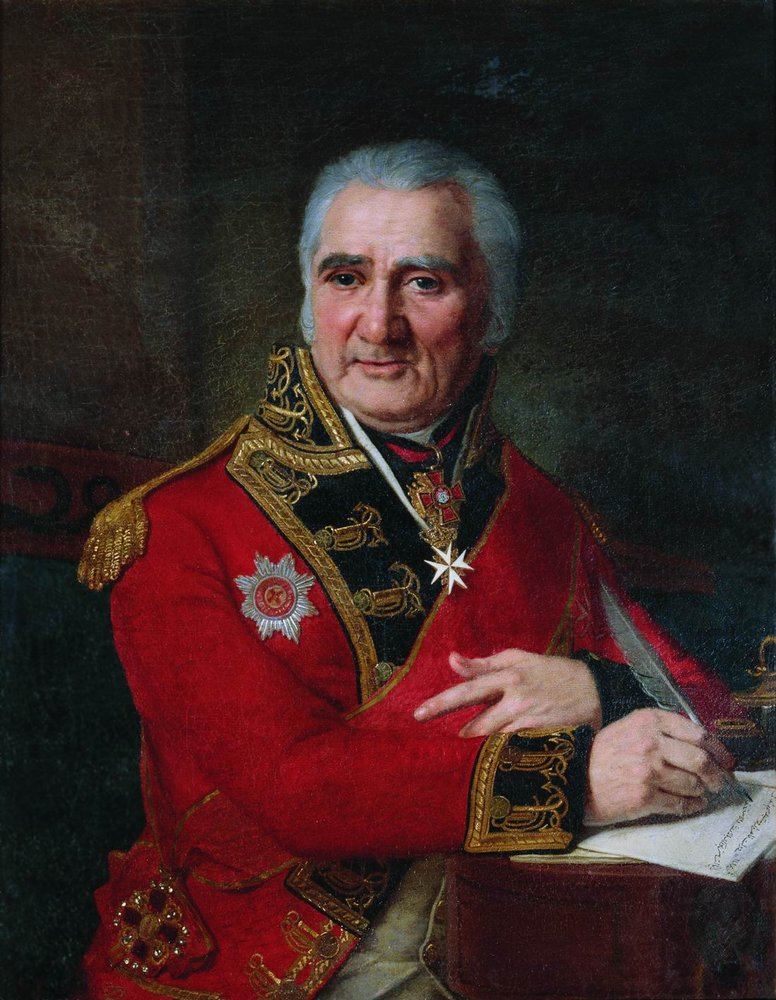 Лашкарёв Сергей Лазаревич (1739-1814), дипломат, переводчик